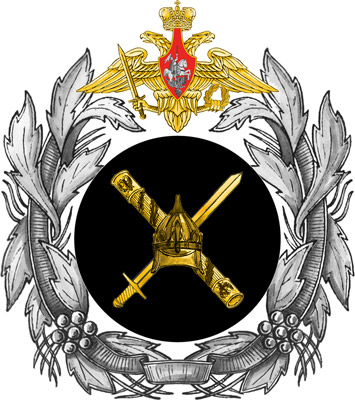 Большая эмблема ГенШтаба ВС России.